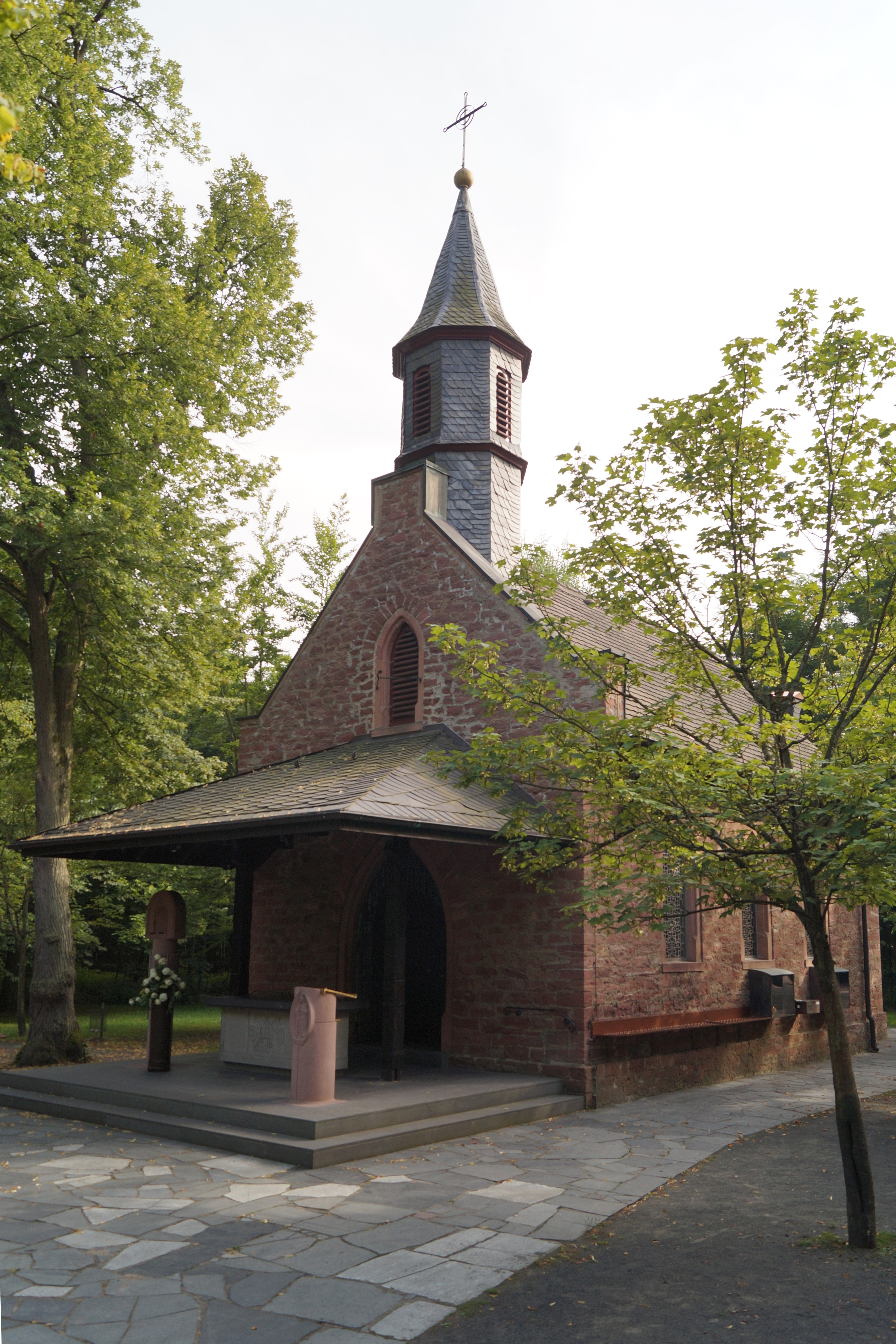 Kapelle in der Liebfrauenheide bei Hainburg, Ansicht von NO 2014